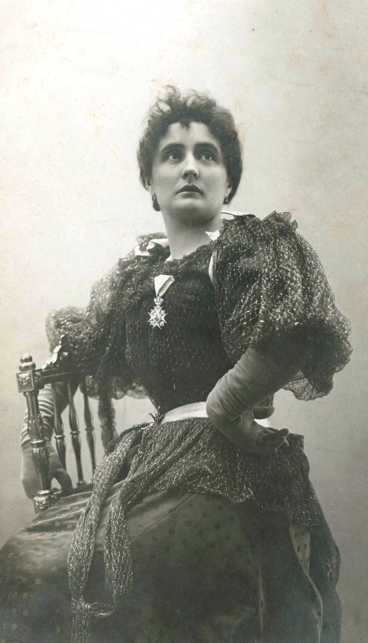 Вела Нигринова (1862—1908) — сербская драматическая актриса